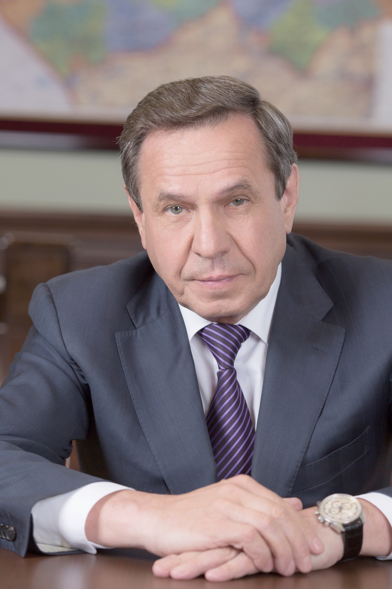 Городецкий Владимир Филиппович - Губернатор Новосибирской области.